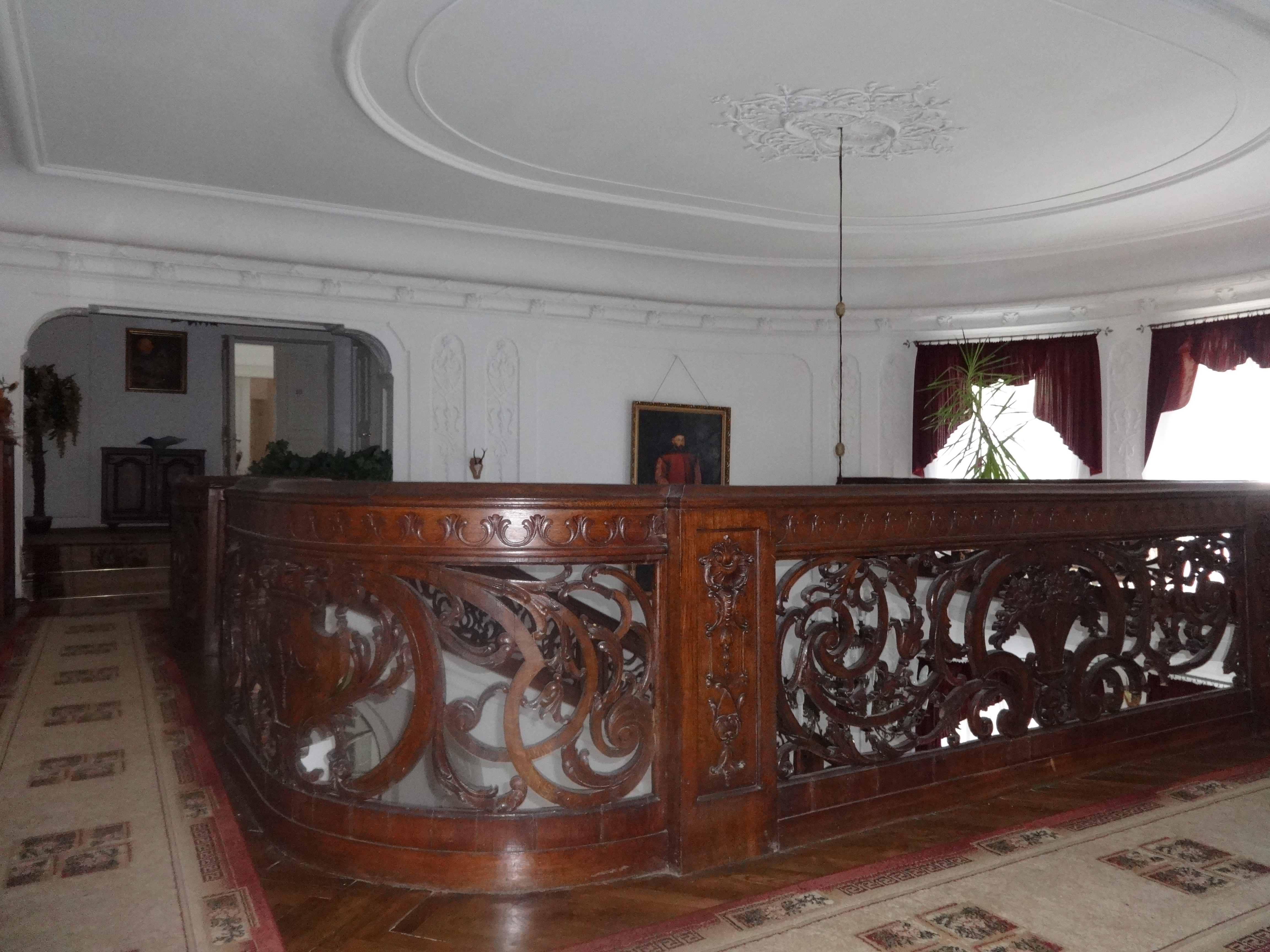 Gorlice Siary, ul. Węgierska 135-141 - pałac, 1908